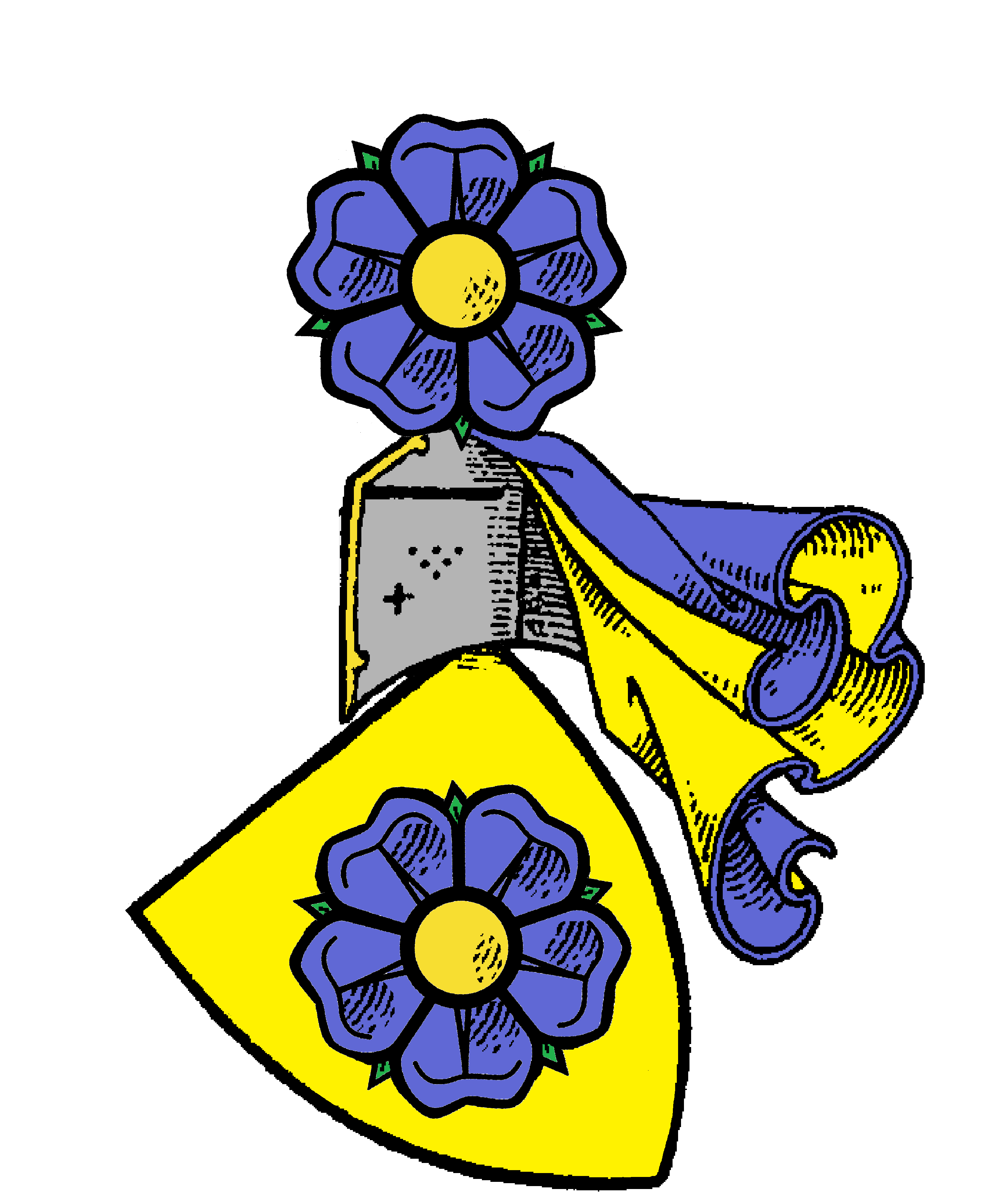 Prostý erb pánů ze Stráže